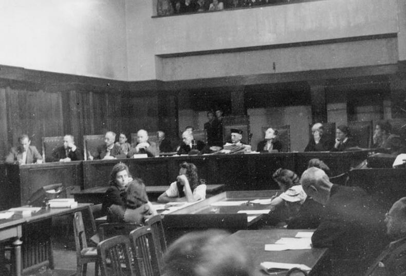 ADN/Illus Am Montag Urteil im Dresdner Ärzteprozeß Die Todesstrafe und Einziehung des Vermögens zu Gunsten des Landes Sachsen beantragte der Staatsanwalt im Dresdner Ärzteprozeß gegen die Angeklagten Dr. Nitsche, Dr. Langer, Dr. Herzer, Dr. Leonhardt, die Oberschwester Sachse, die Schwestern Puschmann, Klara Friedrich und Ackermann, sowie die Pfleger Fehre und Gäbler. Die Strafen für die anderen Angeklagten stellte er in das Ermessen des Gerichts. UBz: Das Hohe Schwurgericht, i.d.Migtte: Landesgerichtsdirektior Dr. Fischer und Landespräsident Fischer